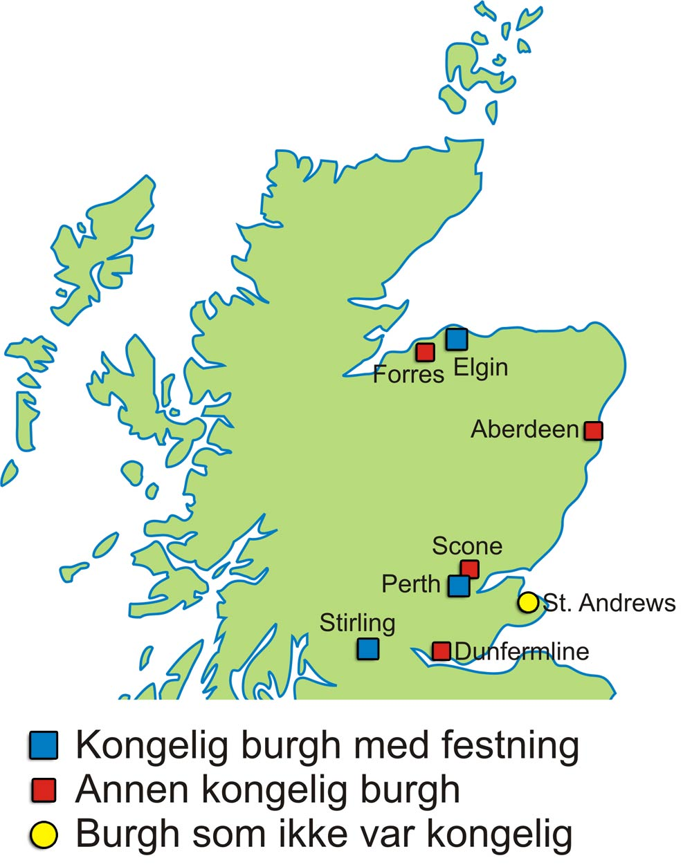 Skottland i høymiddelalderen: Skottlands første byer Jeg har tegnet tegningen selv